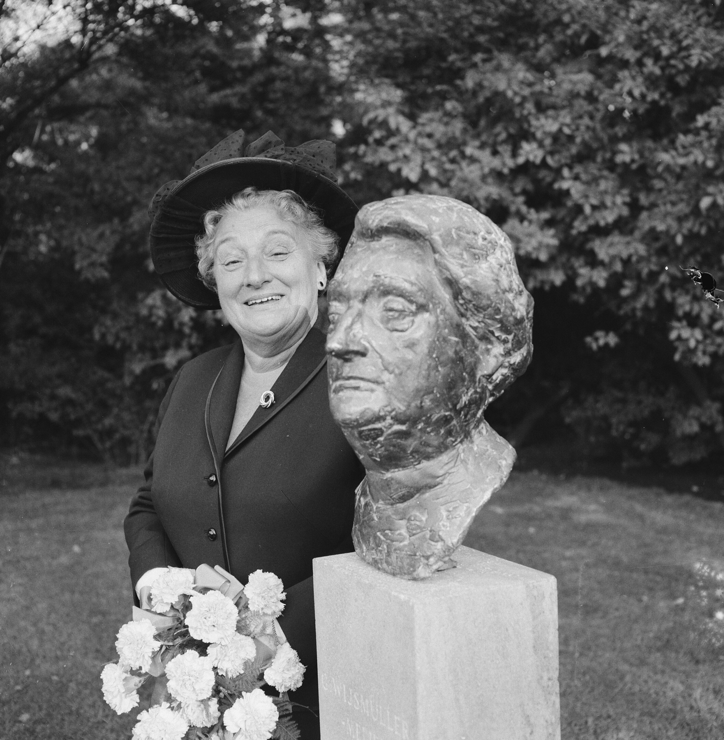 Collectie / Archief : Fotocollectie Anefo Reportage / Serie : [ onbekend ] Beschrijving : Onthulling portretbuste van mevrouw Wijsmuller in Prinses Beatrixoord in het Oosterpark te Amsterdam, mevrouw Wijsmuller naast haar beeld Annotatie : Toen het Beatrixoord werd opgeheven nam ze het beeld mee naar huis. Na haar dood in 1978 is het herplaatst op het Bachplein Datum : 20 september 1965 Locatie : Amsterdam, Noord-Holland Trefwoorden : beelden, beeldhouwkunst, onthullingen Persoonsnaam : Wijsmuller-Meijer, Truus Fotograaf : Kroon, Ron / Anefo Auteursrechthebbende : Nationaal Archief Materiaalsoort : Negatief (zwart/wit) Nummer archiefinventaris : bekijk toegang 2.24.01.03 Bestanddeelnummer : 918-2067 Reacties Geplaatst door Peter van der Krogt op 01 mei 2009 - 09:21. Het zou toch wel handig zijn als er in de beschrijving had gestaan in welke plaats dit beeld staat. Waar is "prinses Beatrixoord"? Geplaatst door Anoniem op 17 mei 2014 - 09:33. Hallo Peter, Het standbeeld van Tante Truus stond vroeger in het Oosterpark bij het Beatrixoord wat ooit een herstellingsoord was voor welgestelde dames.Het Oosterpark is gelegen in Amsterdam Oost.Later is het verplaatst naar het Bachplein in Amsterdam Zuid. Ik vind het jammer dat het nu zo laag staat , op een lage sokkel. Groeten Cora Hackmann